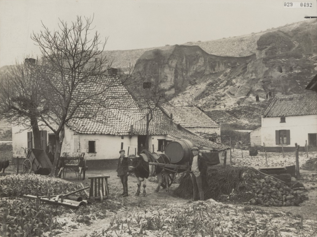 Sint Pietersberg bij Maastricht in 1916: Grote ingang ingestort